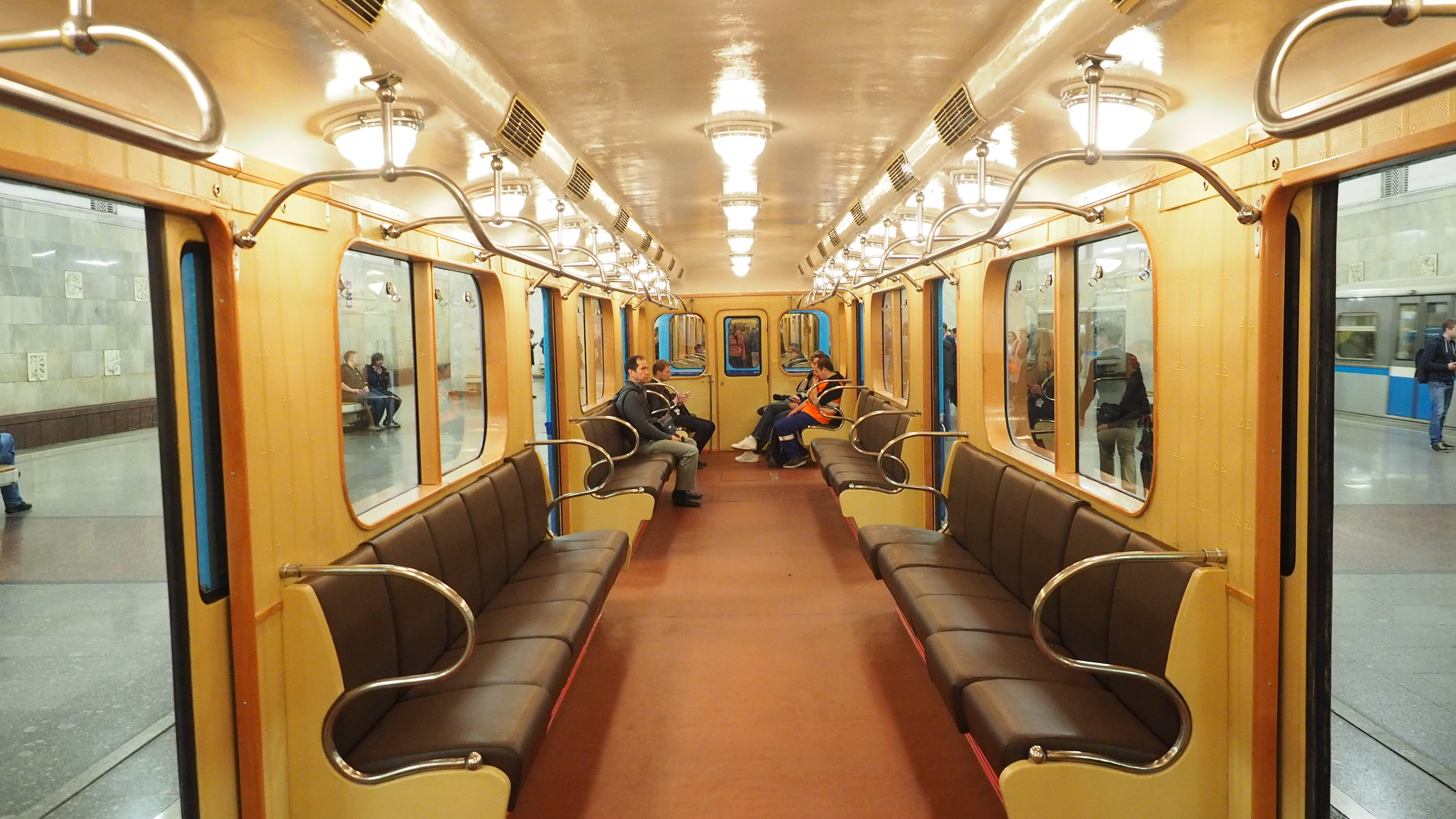 Музейный метровагон Д 2037. Выставка подвижного состава и парад поездов к 80-летию Московского метрополитена 15 мая 2015 года. 15 and 16 may of 2015 Moscow Metro celebrating 80 years of operation. There is a for frist time exibition of recently restored historic cars at siding track of Partizanskaya station. 15 и 16 мая 2015 в Москве отмечалось 80 лет Московскому метро. Впервые была устроена выставка исторических вагонов. Они были расставлены на 3 пути станции Партизанская.